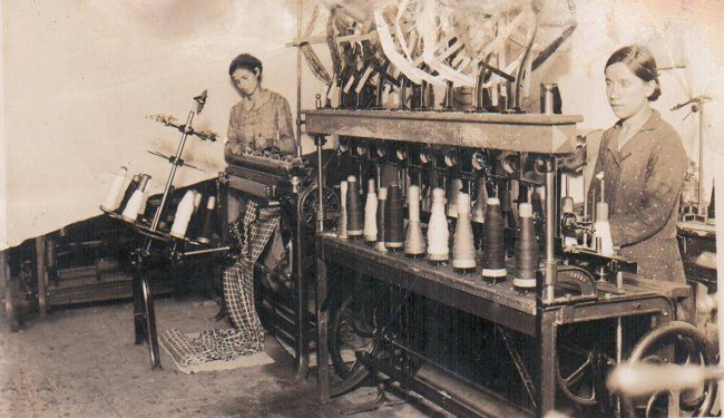 Punuese ne Fabriken e Trikotazhit ne Korce